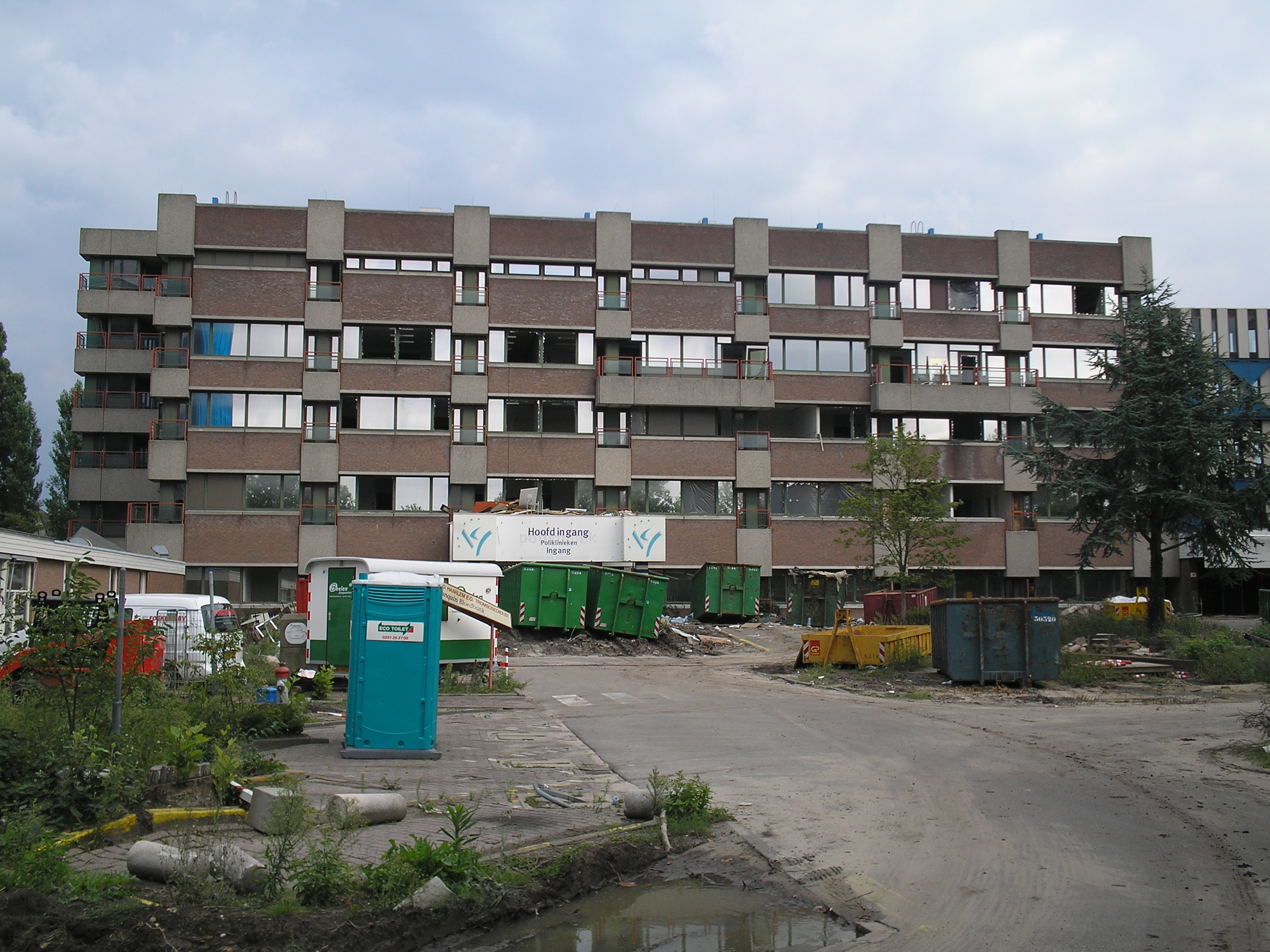 PD (eigen werk)